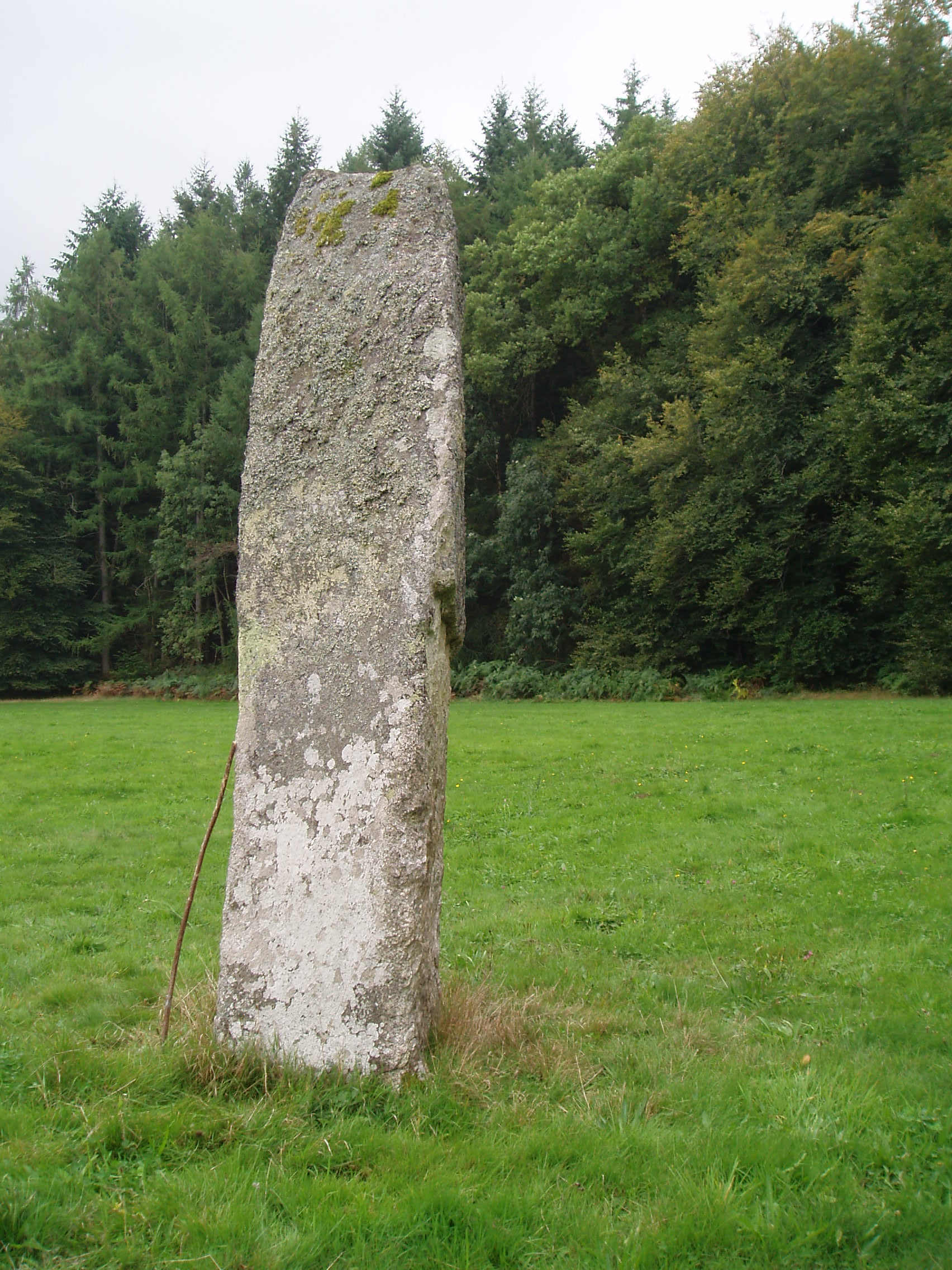 Menhir